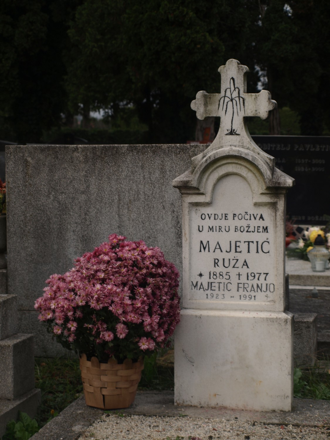 Grob Franje Majetića u Varaždinu